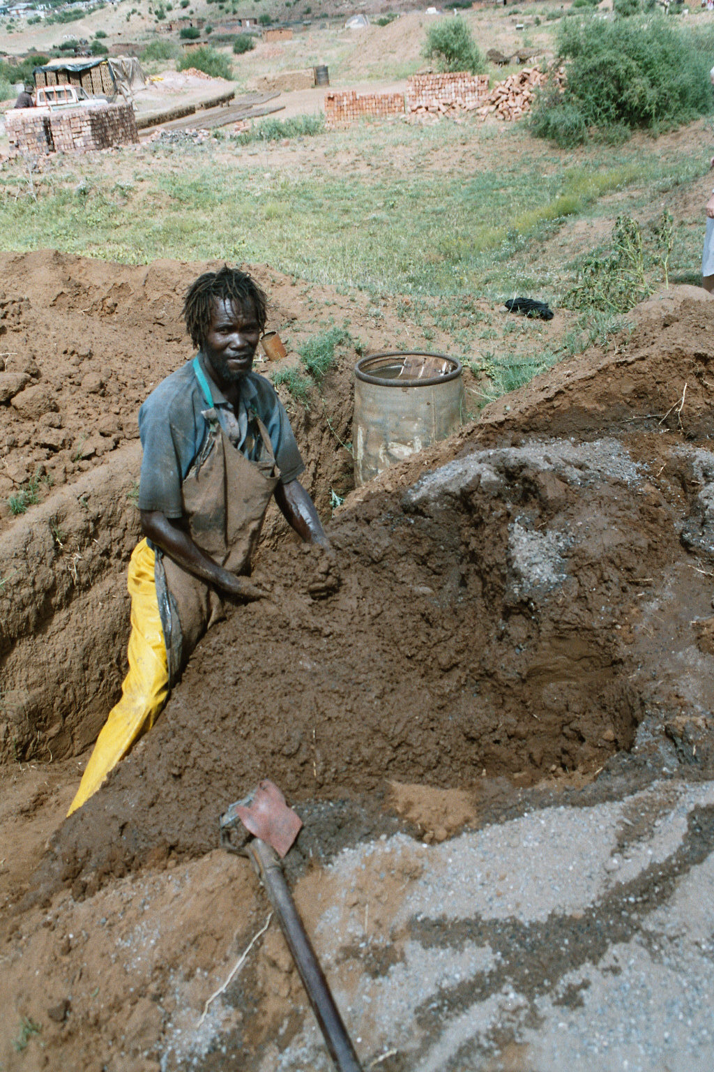 Herstellung von Handstrichziegeln - Vorbereitung des Lehms. Bei Dukatole (Maletswai, Südafrika).